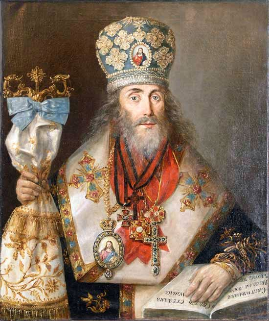 Архиеп. Евгений (Казанцев), 1840-е. Портрет работы неизвестного художника